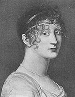 Caroline Jagemann (Opernsängerin u. Schauspielerin in Weimar, 1777-1848)